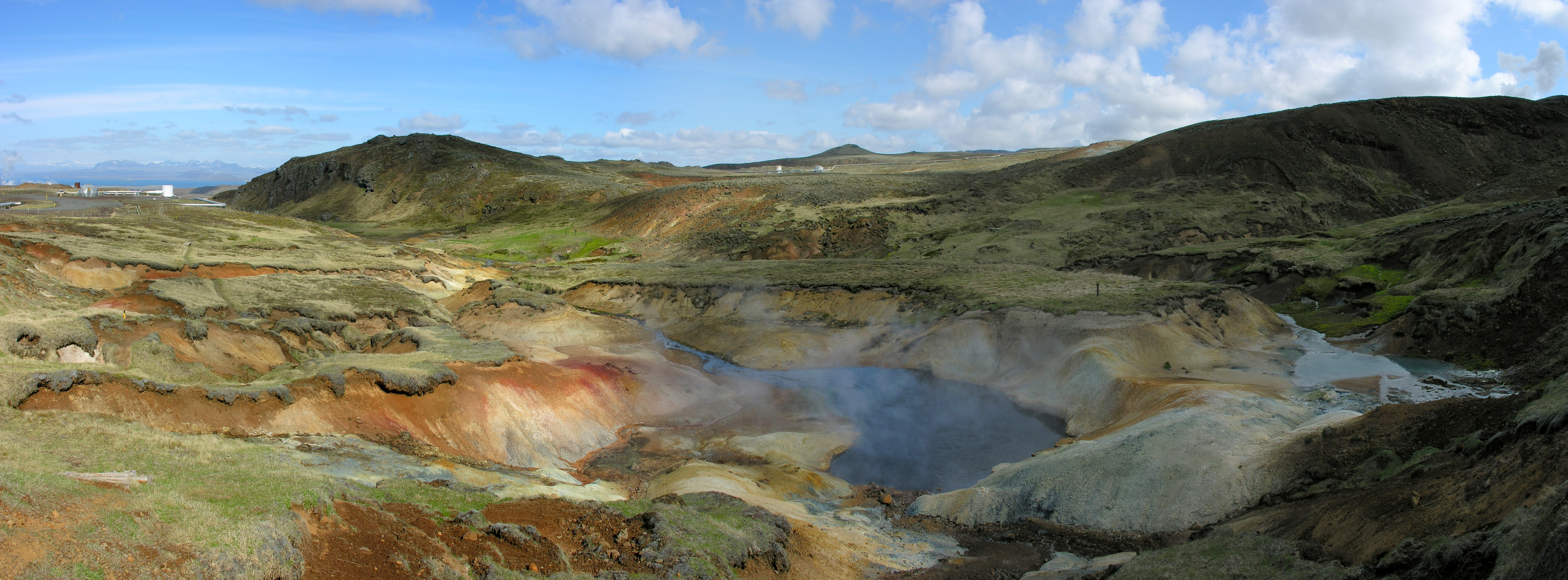 Nesjavellir